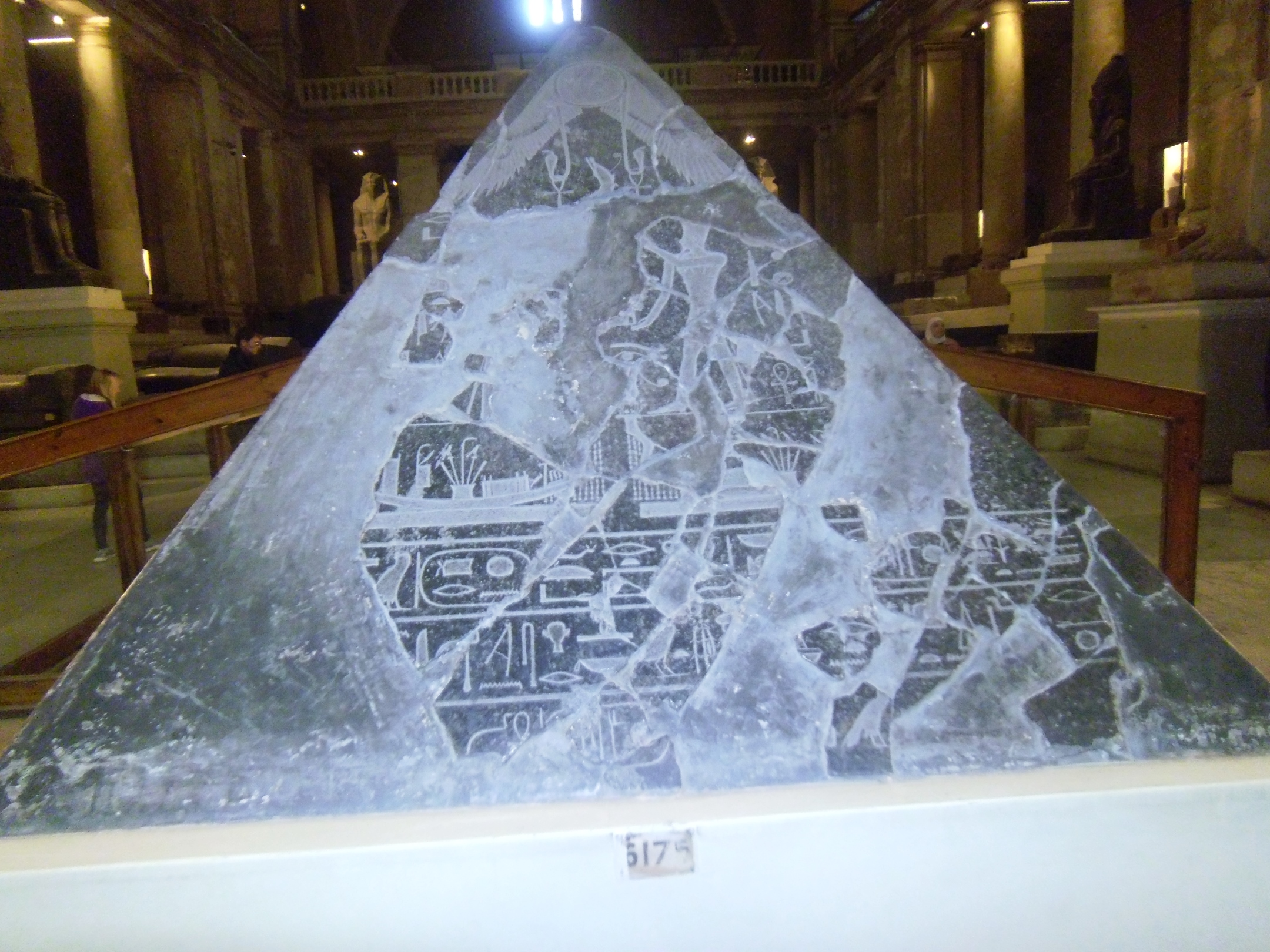 Египетский национальный музей археологии. Каир. Интерьеры музея